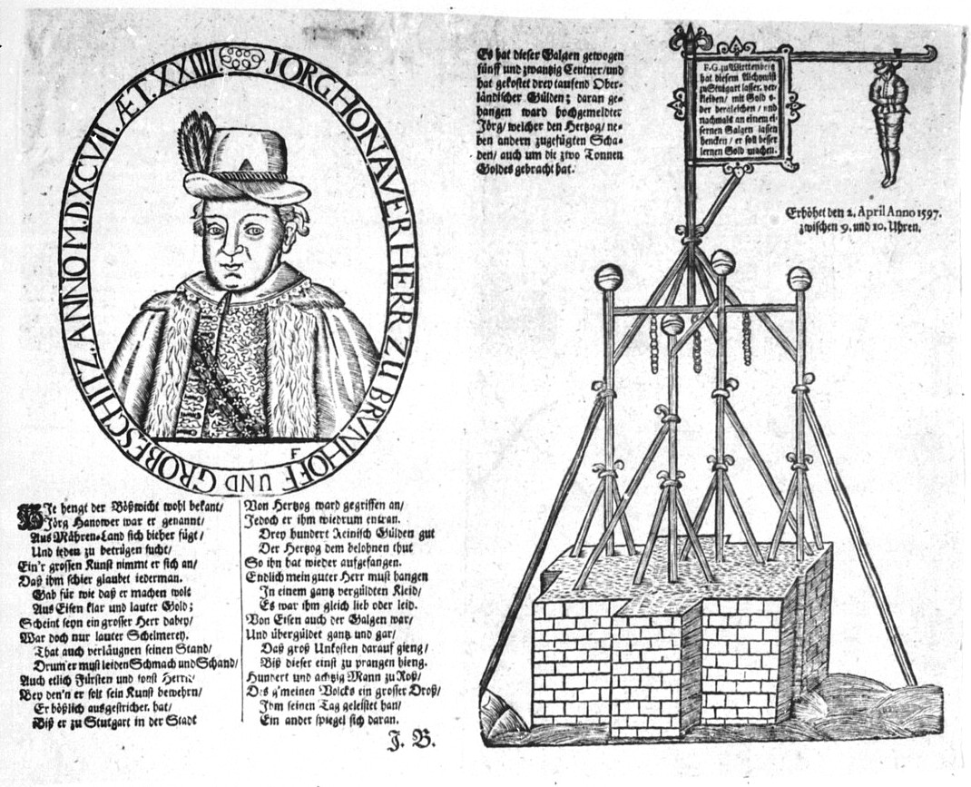 Flugblatt: Die Hinrichtung des betrügerischen Alchimisten Georg Honauer auf dem eigens aufgerichteten "Eisernen Galgen" in Stuttgart, 2. April 1597.